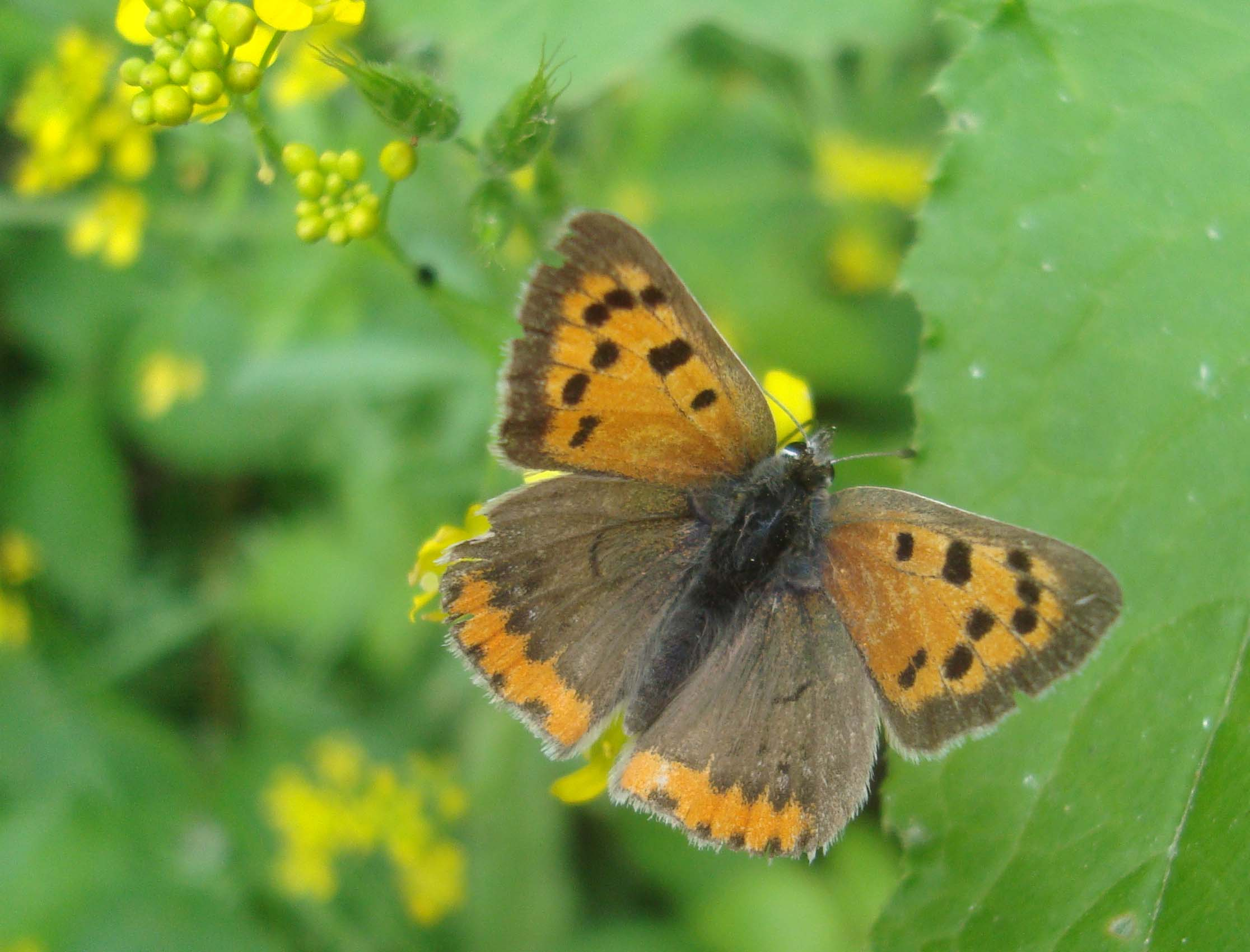 Motýl ohniváček černokřídlý (Lycaena phlaeas) Podkomorské lesy, Česká republika, jižní Morava